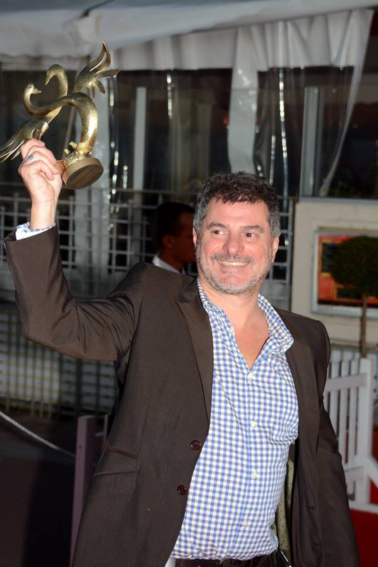 Pierre Salvadori au festival du film de Cabourg